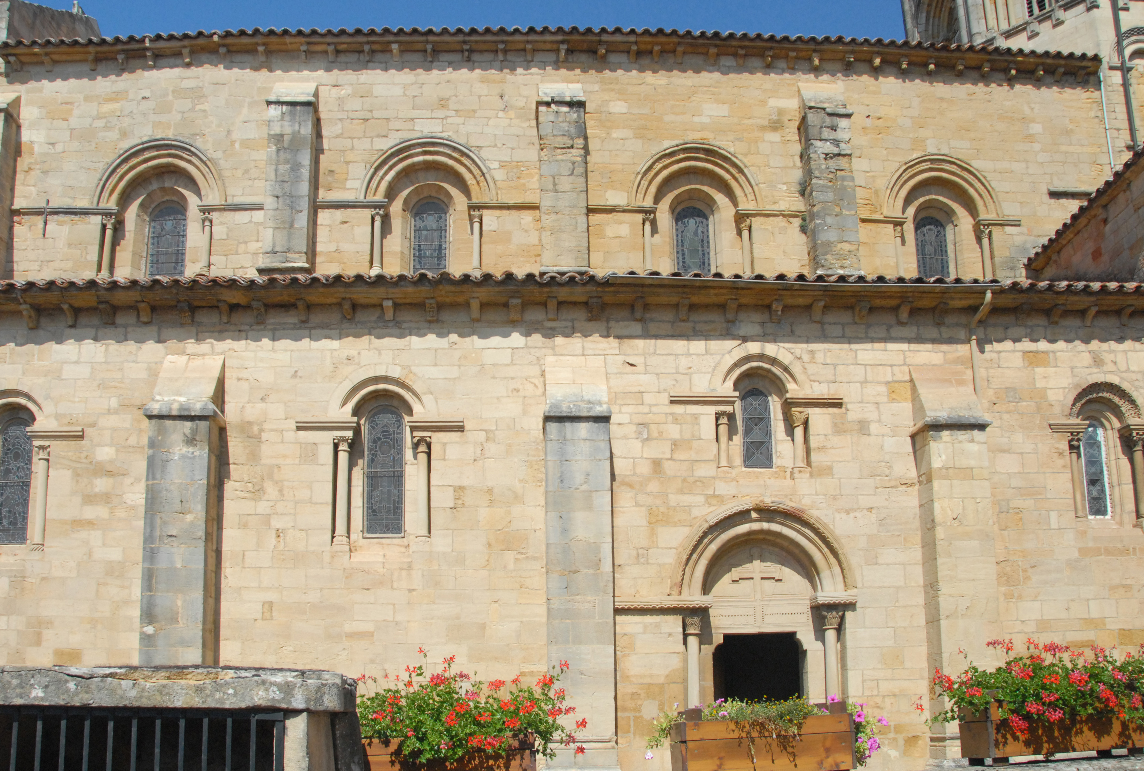 St-Hilaire de Semur-en-Brionnais, Langhaus von S